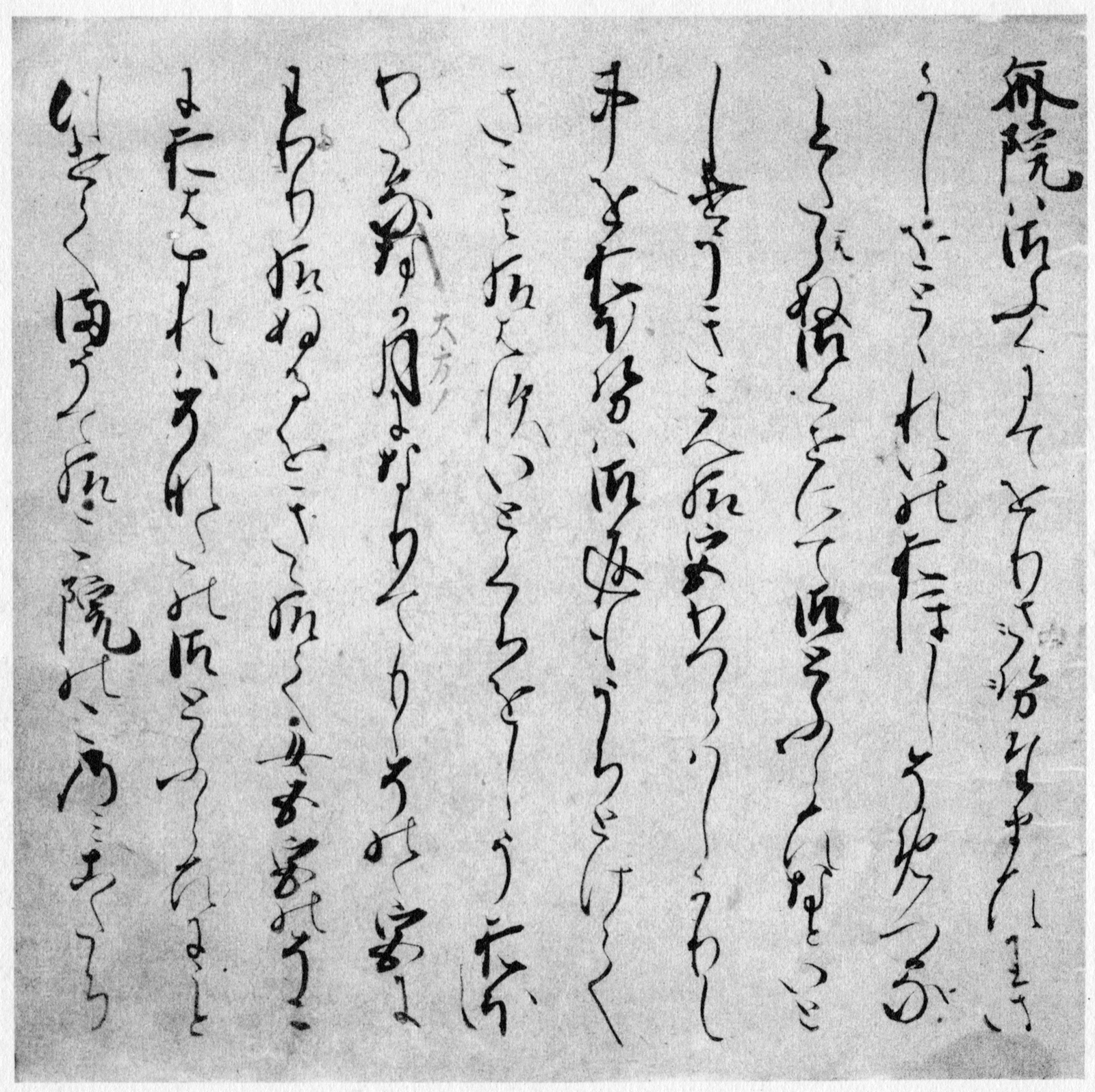 伝・二条為明筆本朝顔巻。『定本源氏物語新解』下巻口絵より。